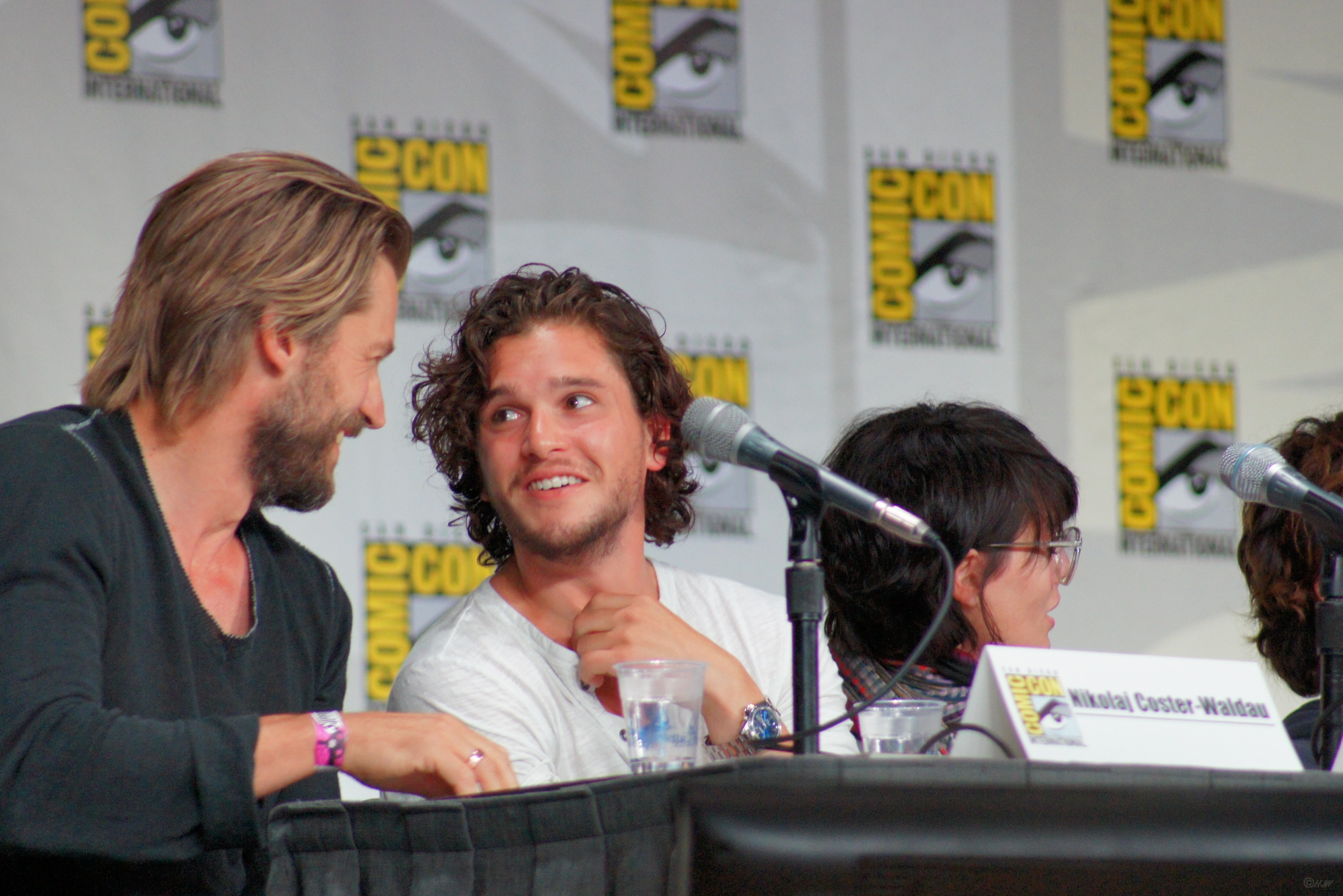 Nikolaj Coster-Waldau, Kit Harington & Lena Headey